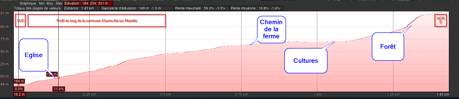 Altimétrie de la commune d'Autreville, suivant un axe Sud-Nord, passant par le village, google et mentions manuscrites